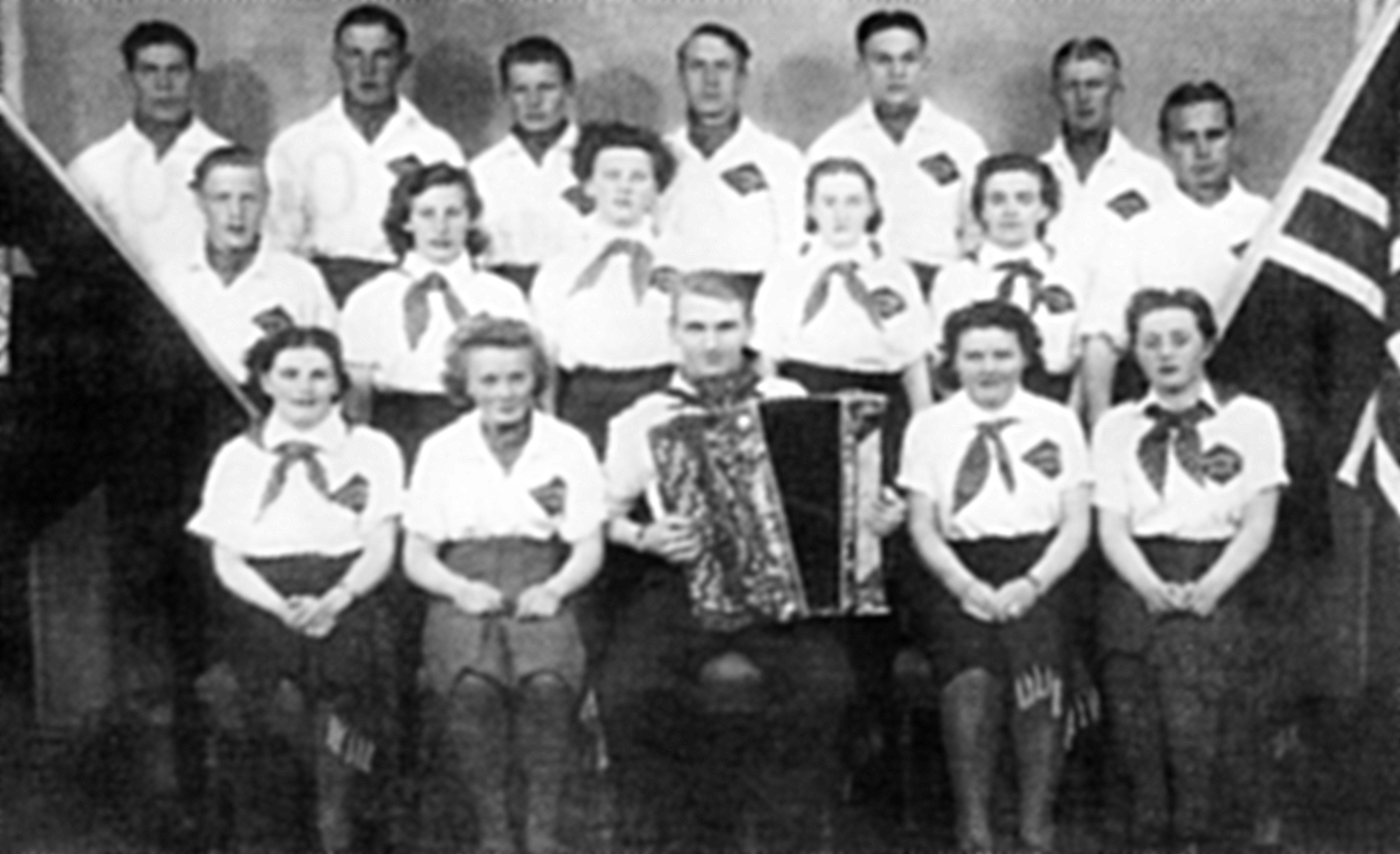 Tramgjengen i Levanger 1939